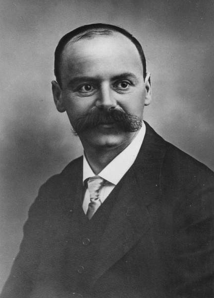 Karl Schwarzschild, german physicist